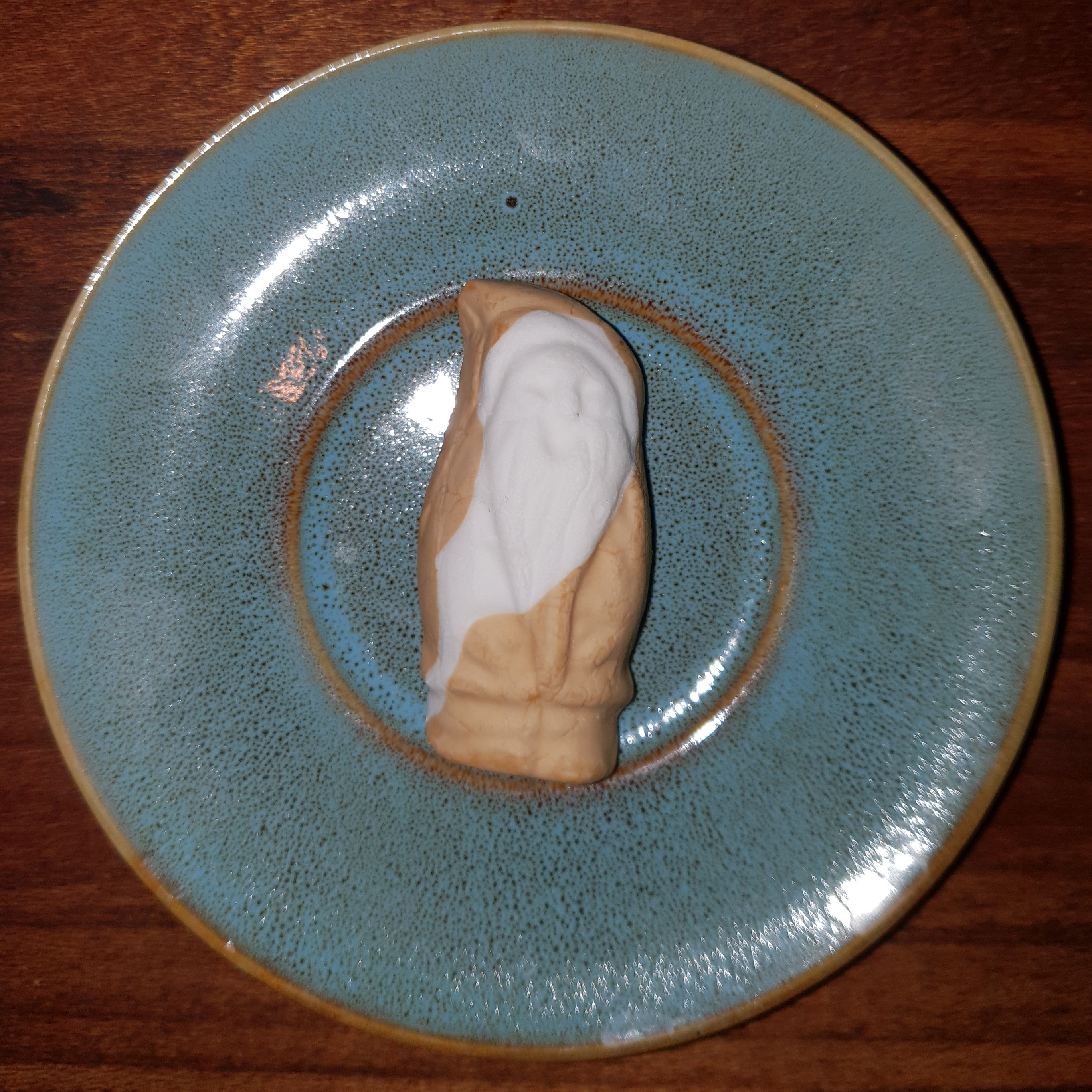 Juleskum (Skumtomte) från Cloetta med 2018 års smak (Kola).